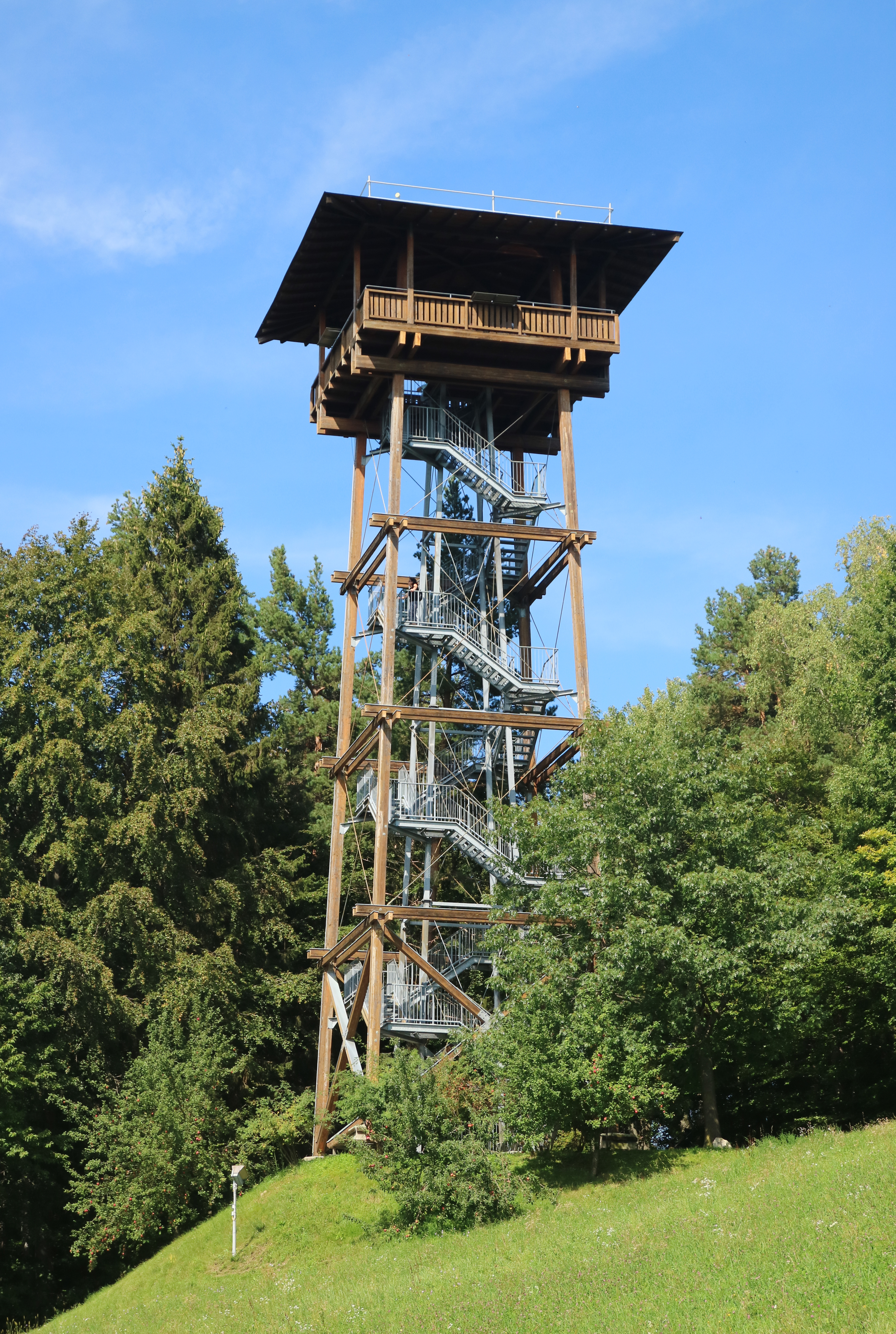 Kreuzbergwarte von Süden, Gemeinde Leutschach an der Weinstraße (Südsteiermark)